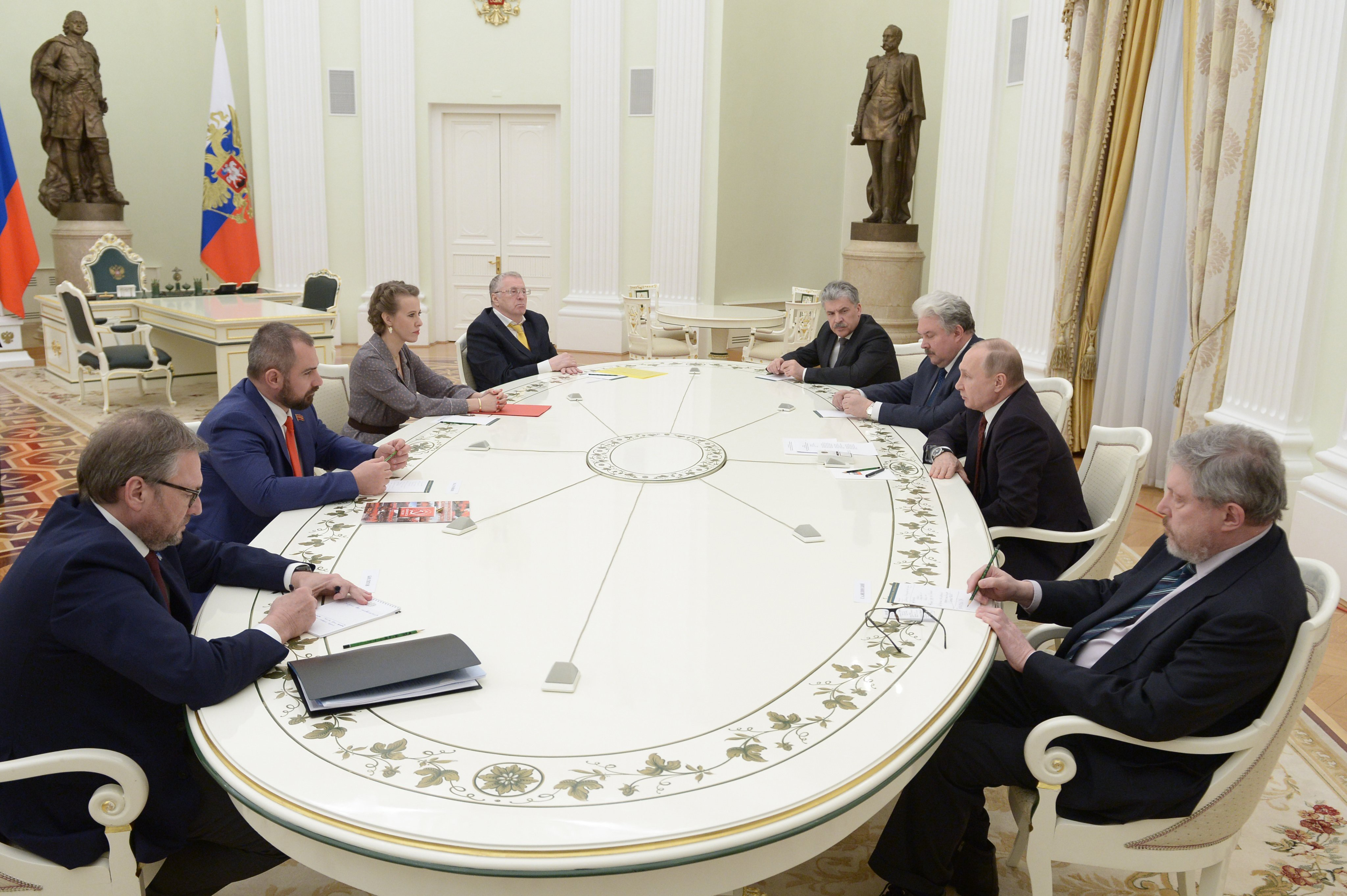 Встреча Владимира Путина с кандидатами на должность Президента Российской Федерации